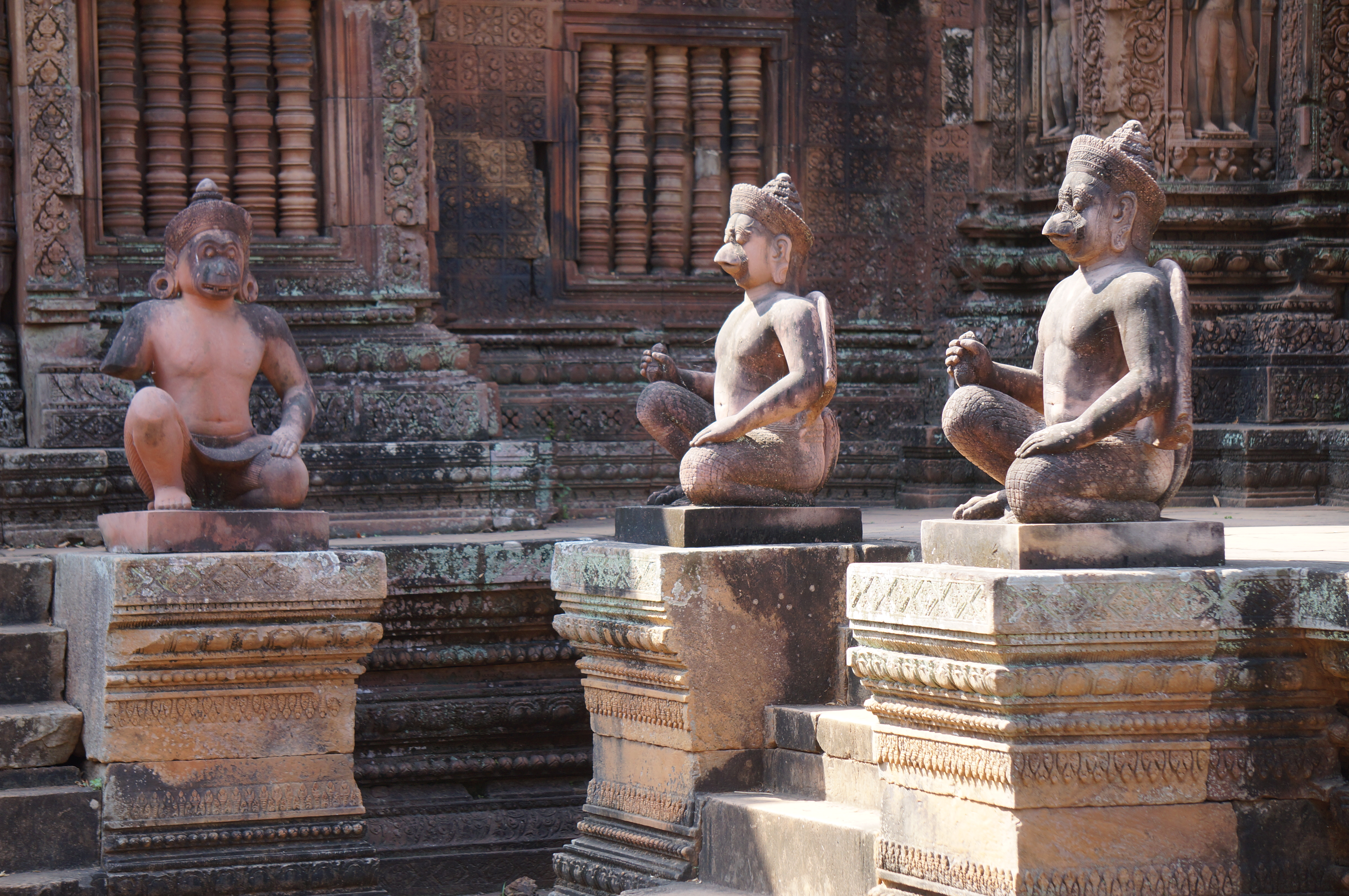 Sculptures des gardiens au sud de Prasat et le mandapa du complexe de Banteay Srei ‚ (la citadelle des femmes), Siem Reap, Cambodge